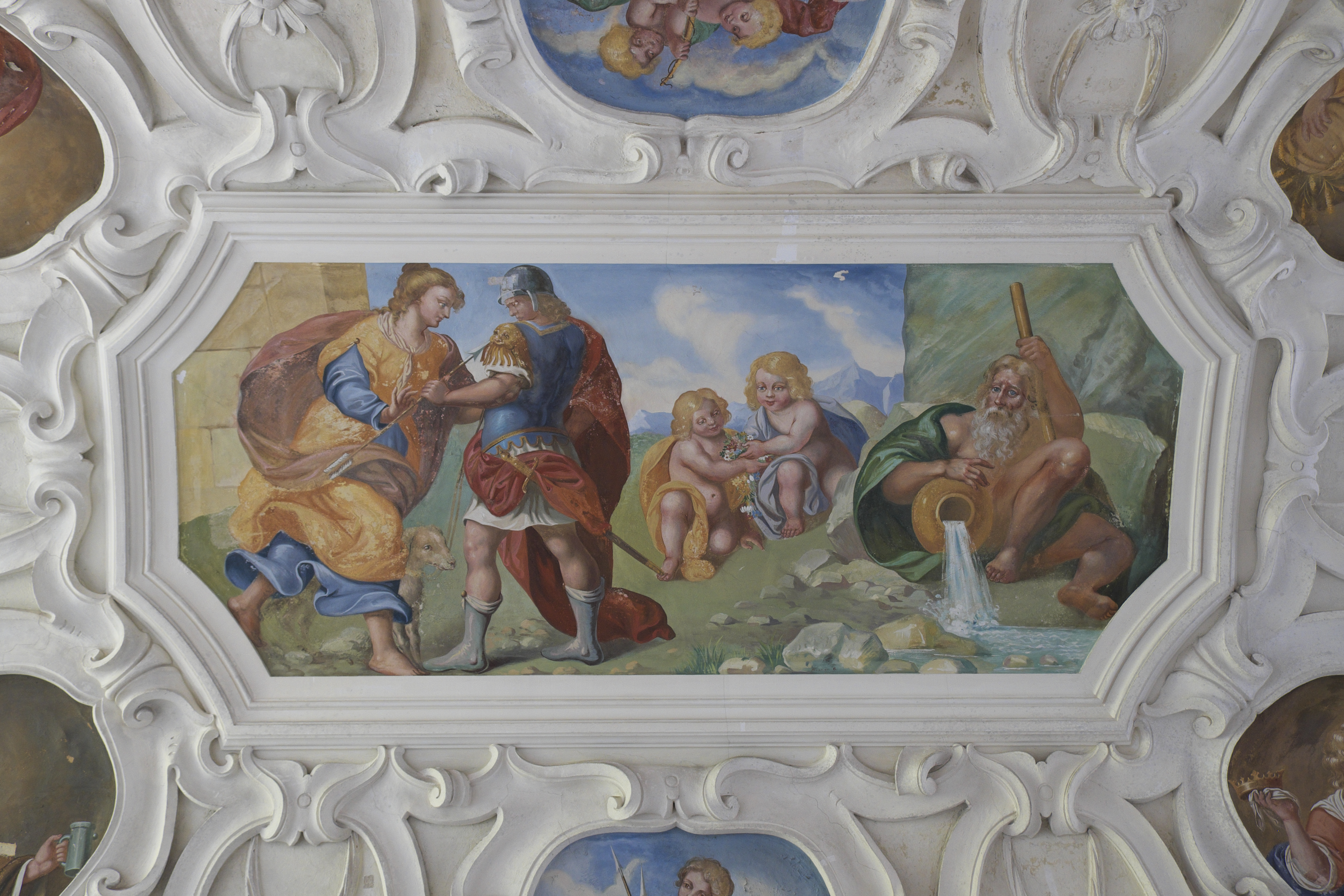 Blumengarten Kroměříž in Kroměříž in der Region Zlin in Tschechien, Stuck und Deckenmalerei in der Rotunde